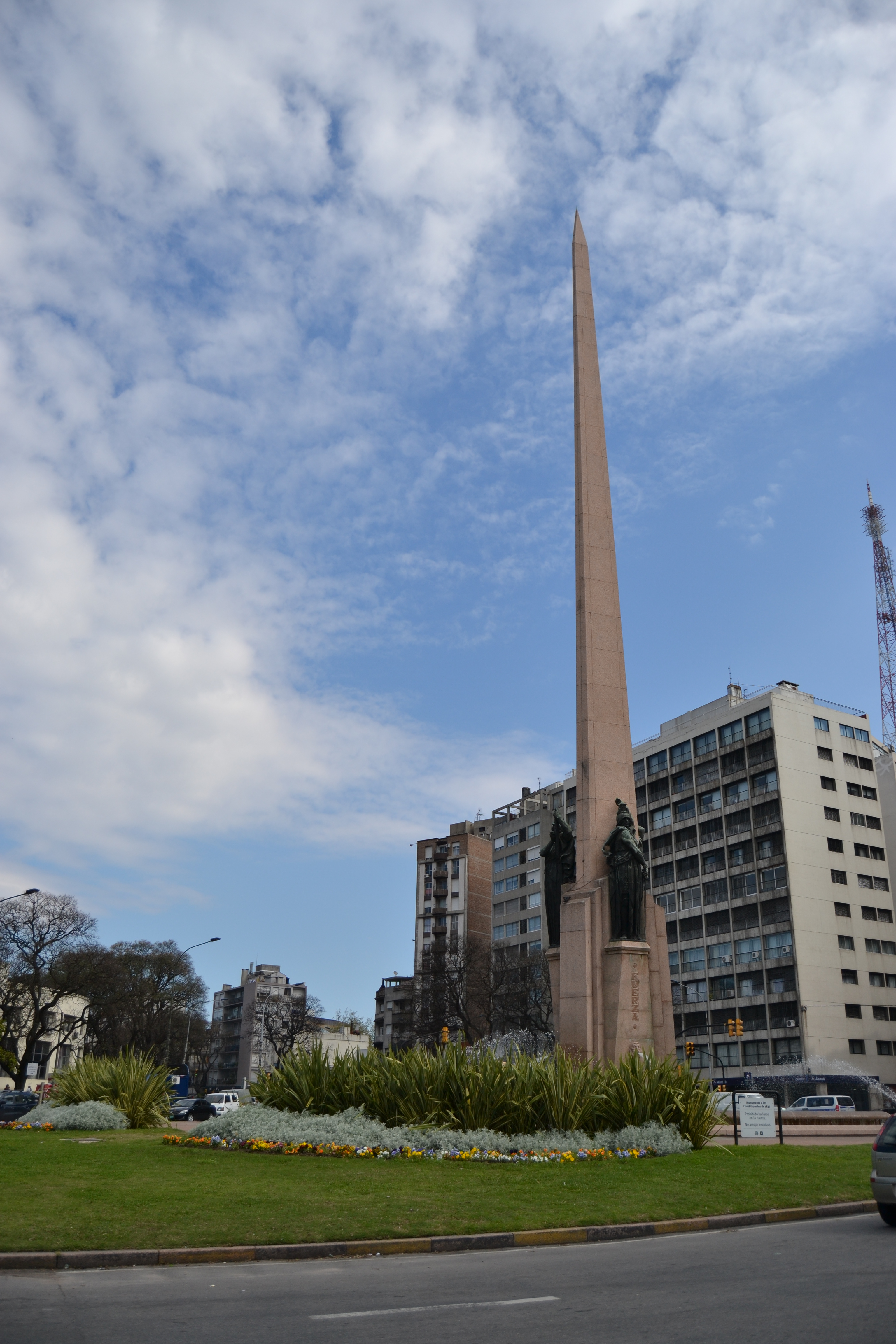 Obelisco a los Constituyentes de 1830. Ubicada en el departamento de Montevideo